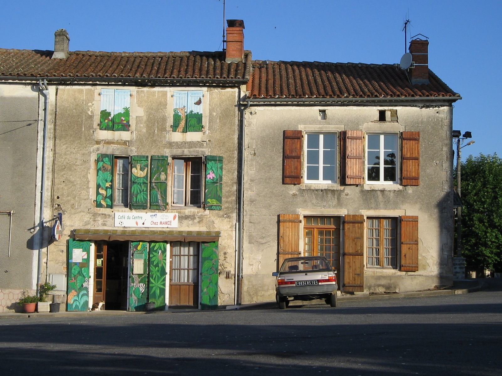 le café "chez mamie" à Montemboeuf (16) en 2008